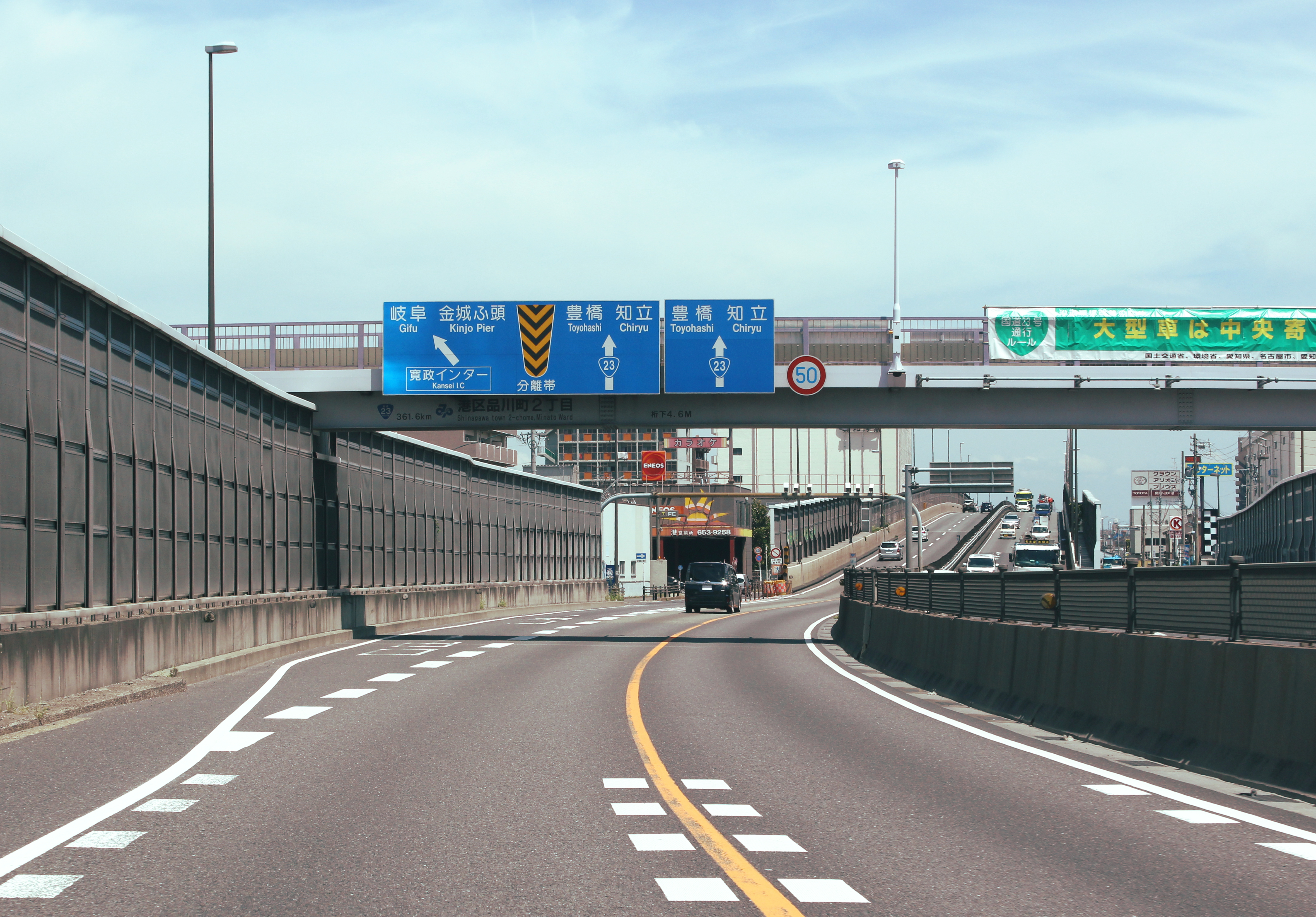 名四バイパス 寛政IC